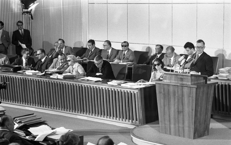 Plenarsitzung des Bundesrates (anwesend die Bundesminister: [Prof. Dr. Karl] Schiller, [Hans-Dietrich] Genscher, [Hans] Leussink, [Käte] Strobel, [Gerhard] Jahn)